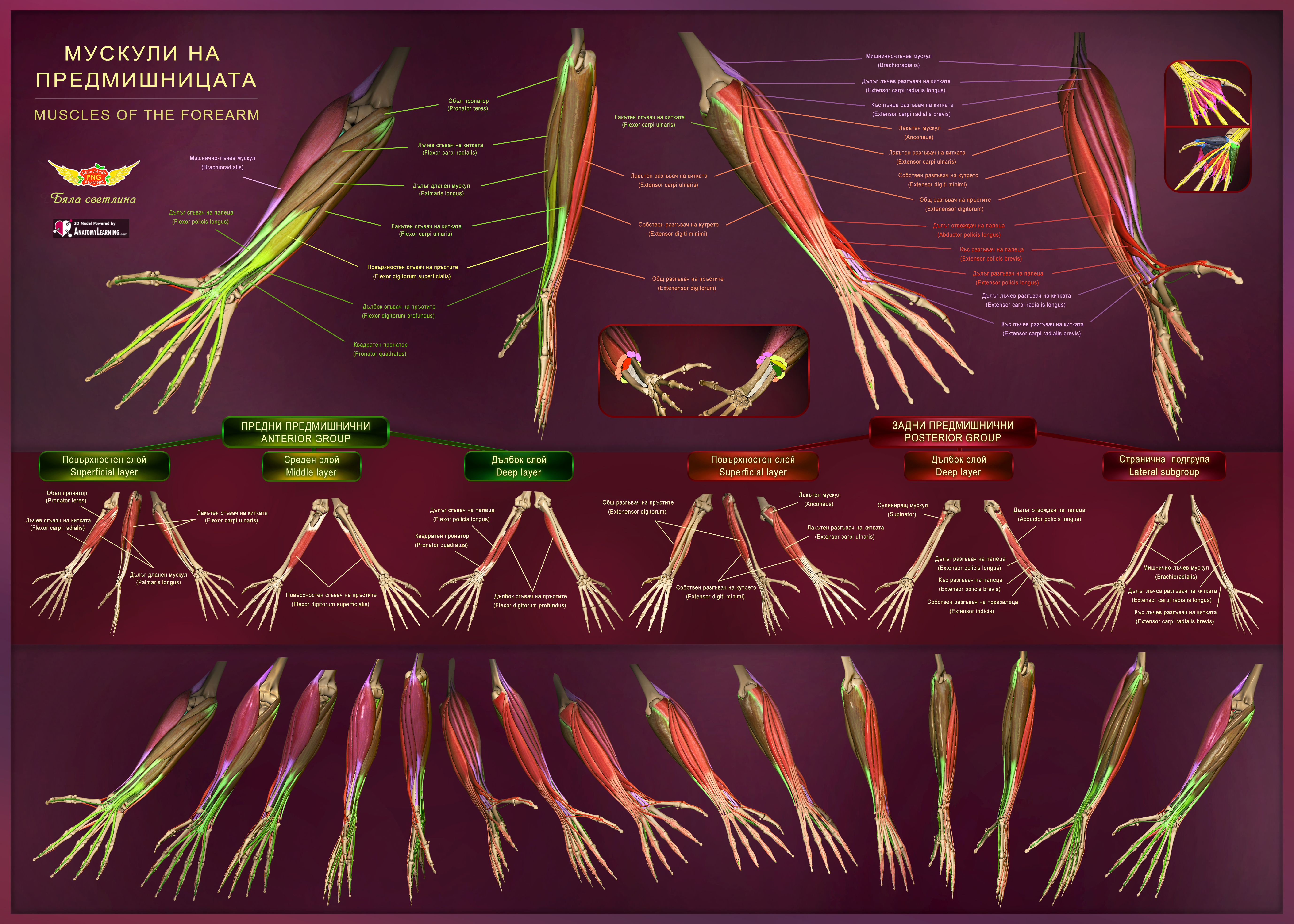 АНАТОМИЯ НА РЪКАТА МУСКУЛИ ПРЕДМИШНИЦА